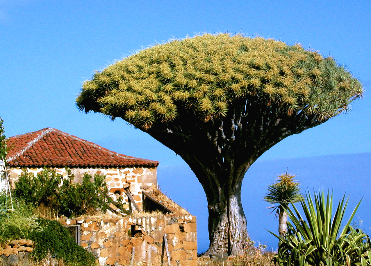 Drago Siete Fuentes, Los Realejos,Tenerife